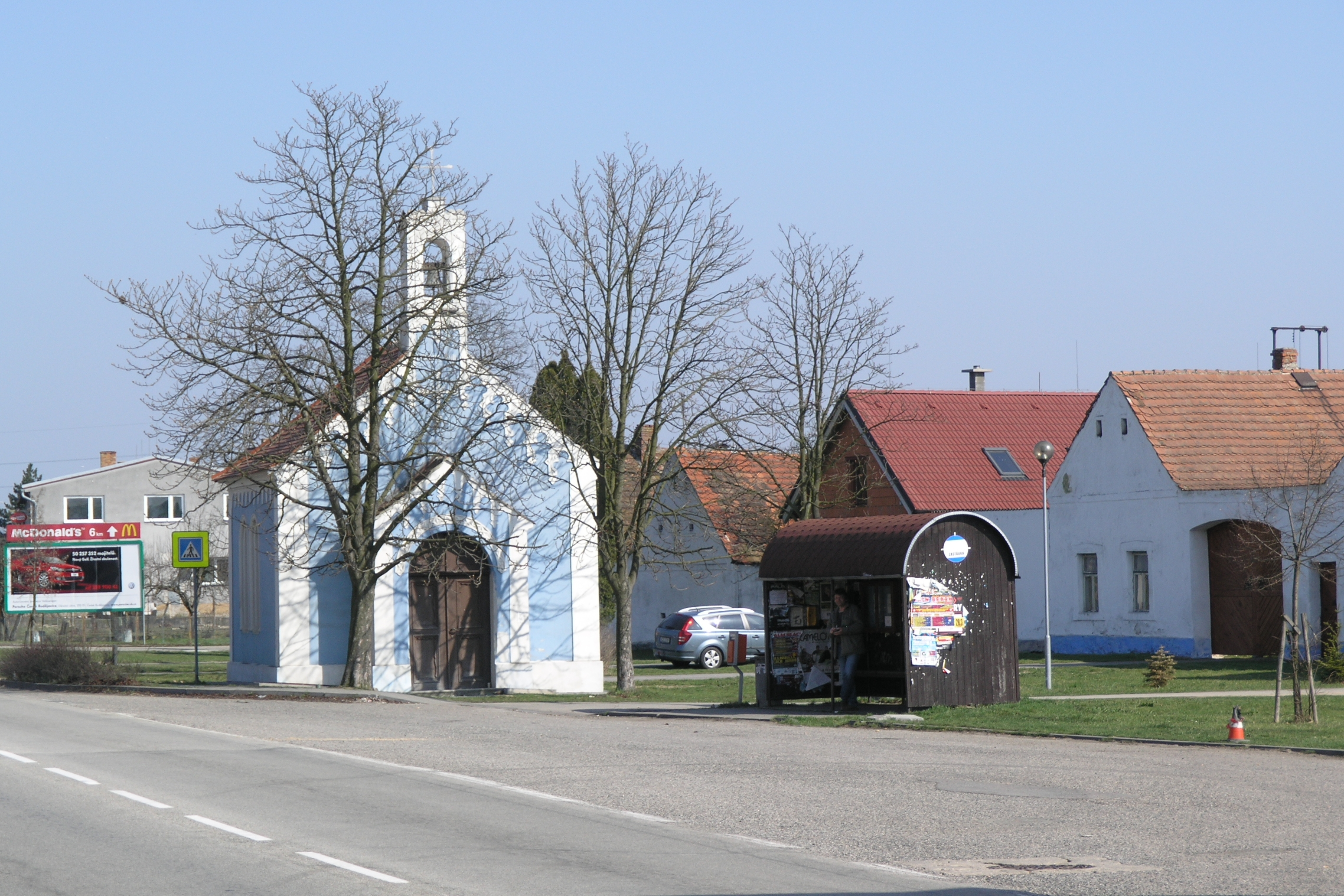 Dasný